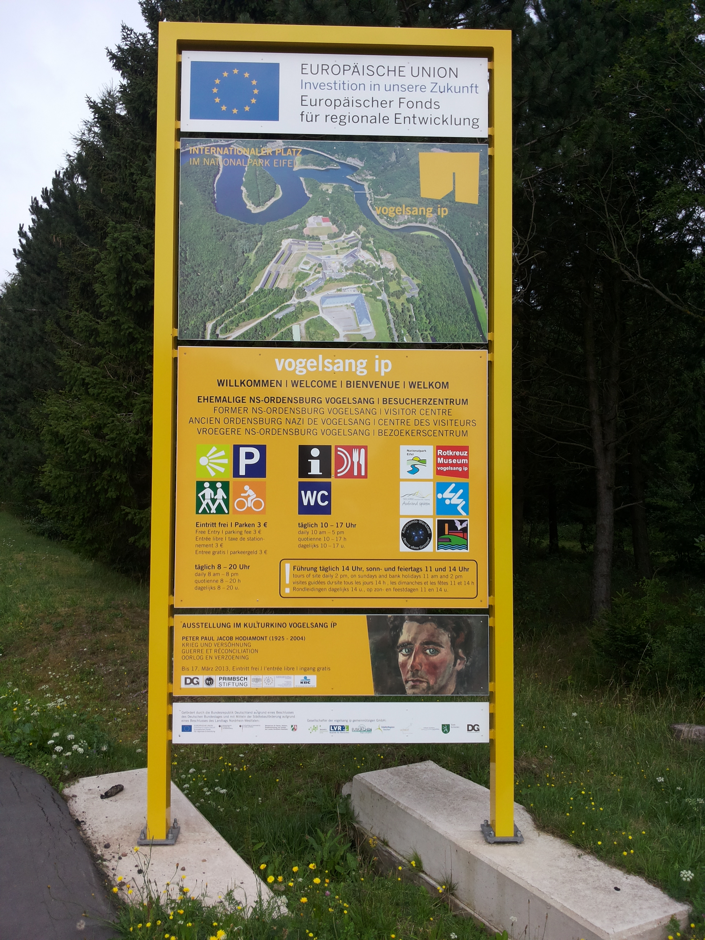 Einfahrt zur heutigen Bildungsstätte Burg Vogelsang